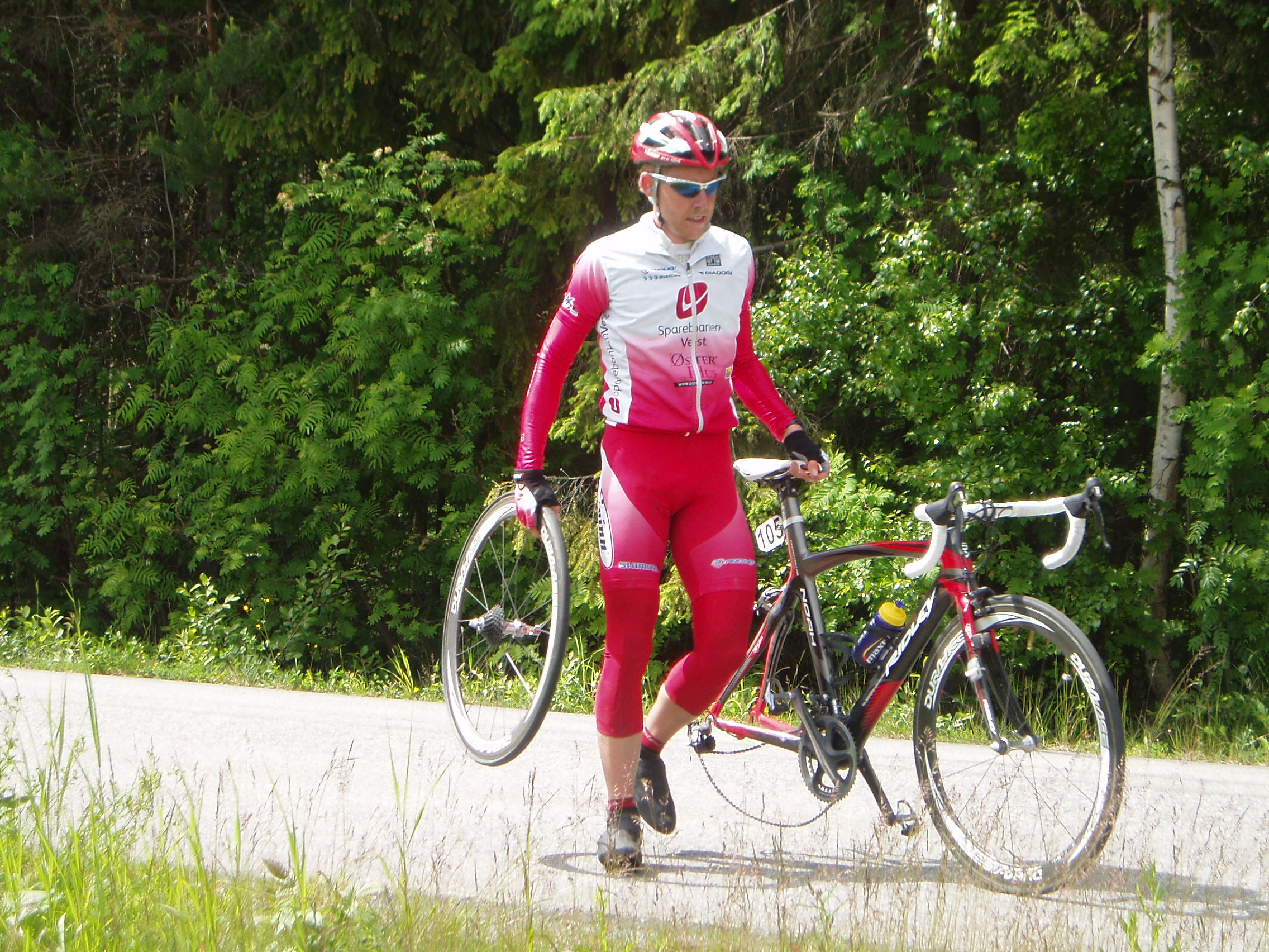 Den norske syklisten Håvard Nybø under Ringerike Grand Prix 2009. Her har han akkurat gitt bakhjulet sitt til en lagkamerat.